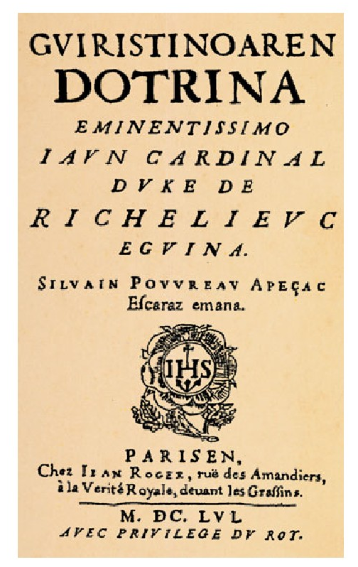 Silvain Pouvreauren Guiristinoaren dotrina-ren lehenbiziko faksimile edizioaren azala (Paris, 1656).